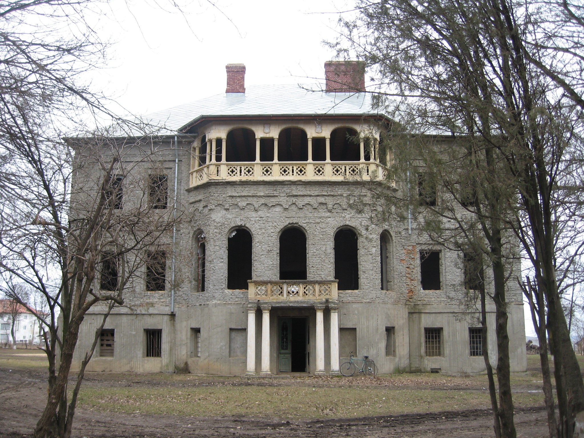 Conacul Carp din Țibănești, jud. Iași, România